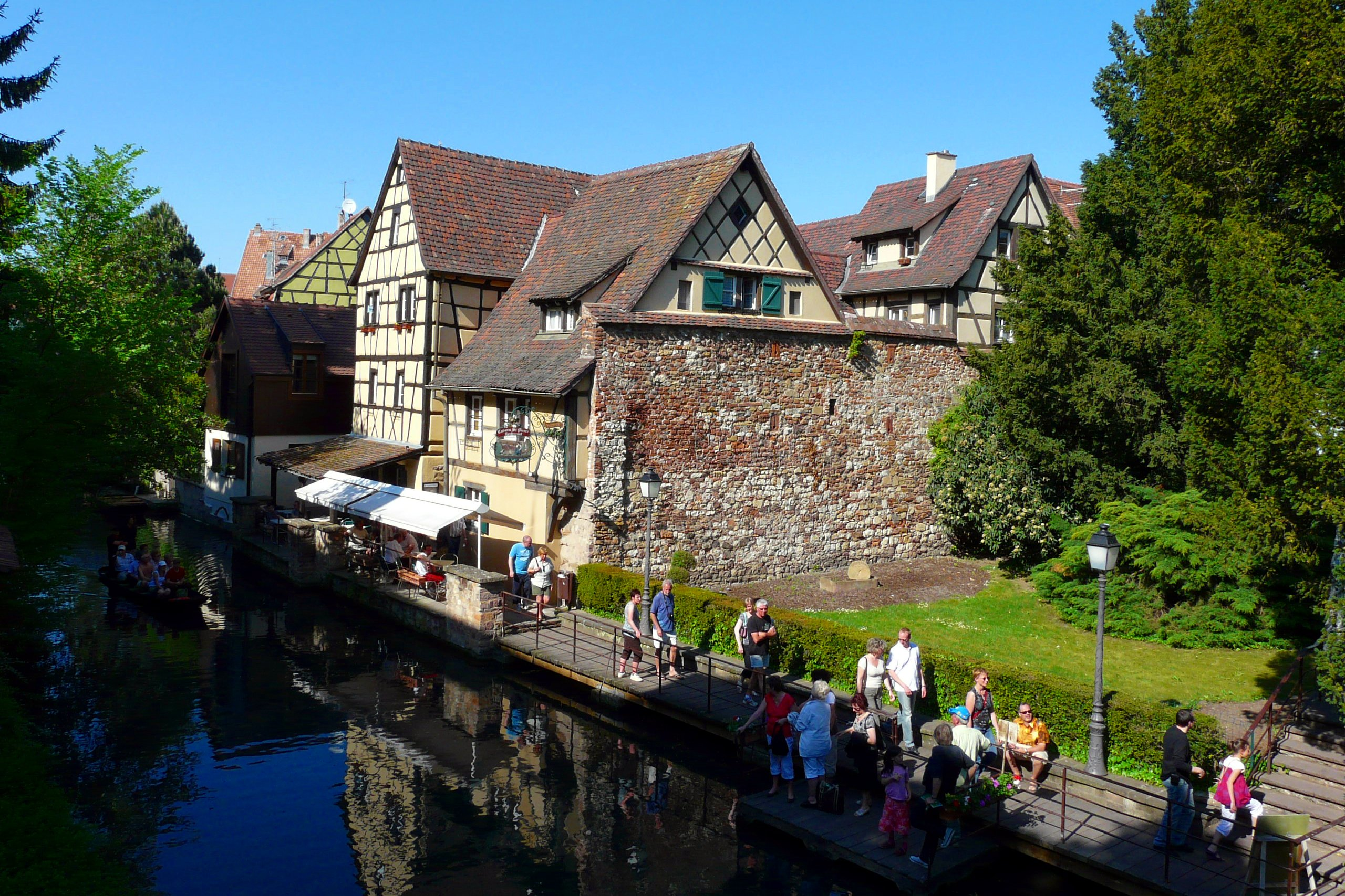 Petite venise, Colmar